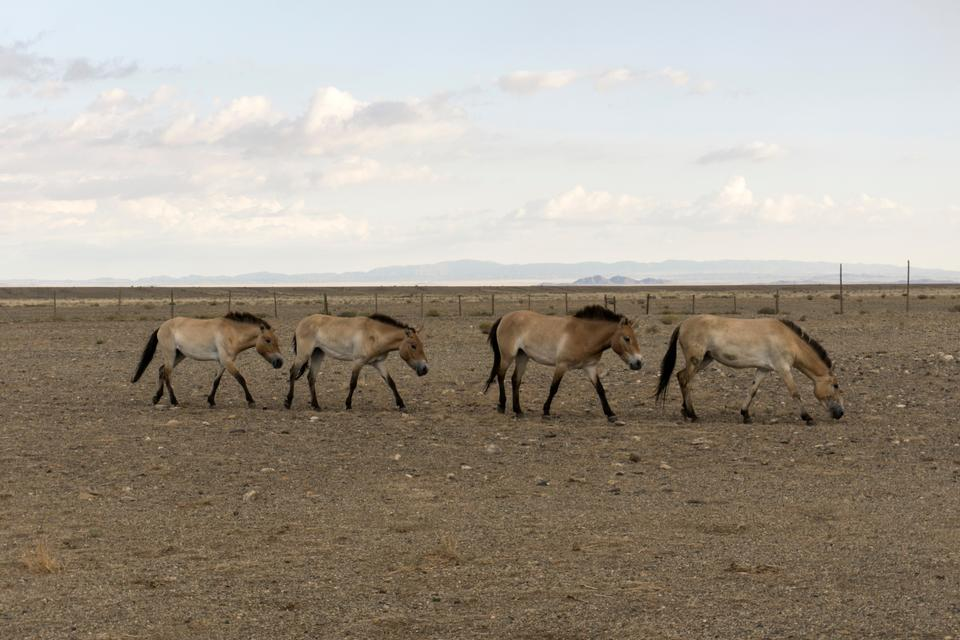 Монгол: Gobi-Altai, Bugat sum, Takhiin tal